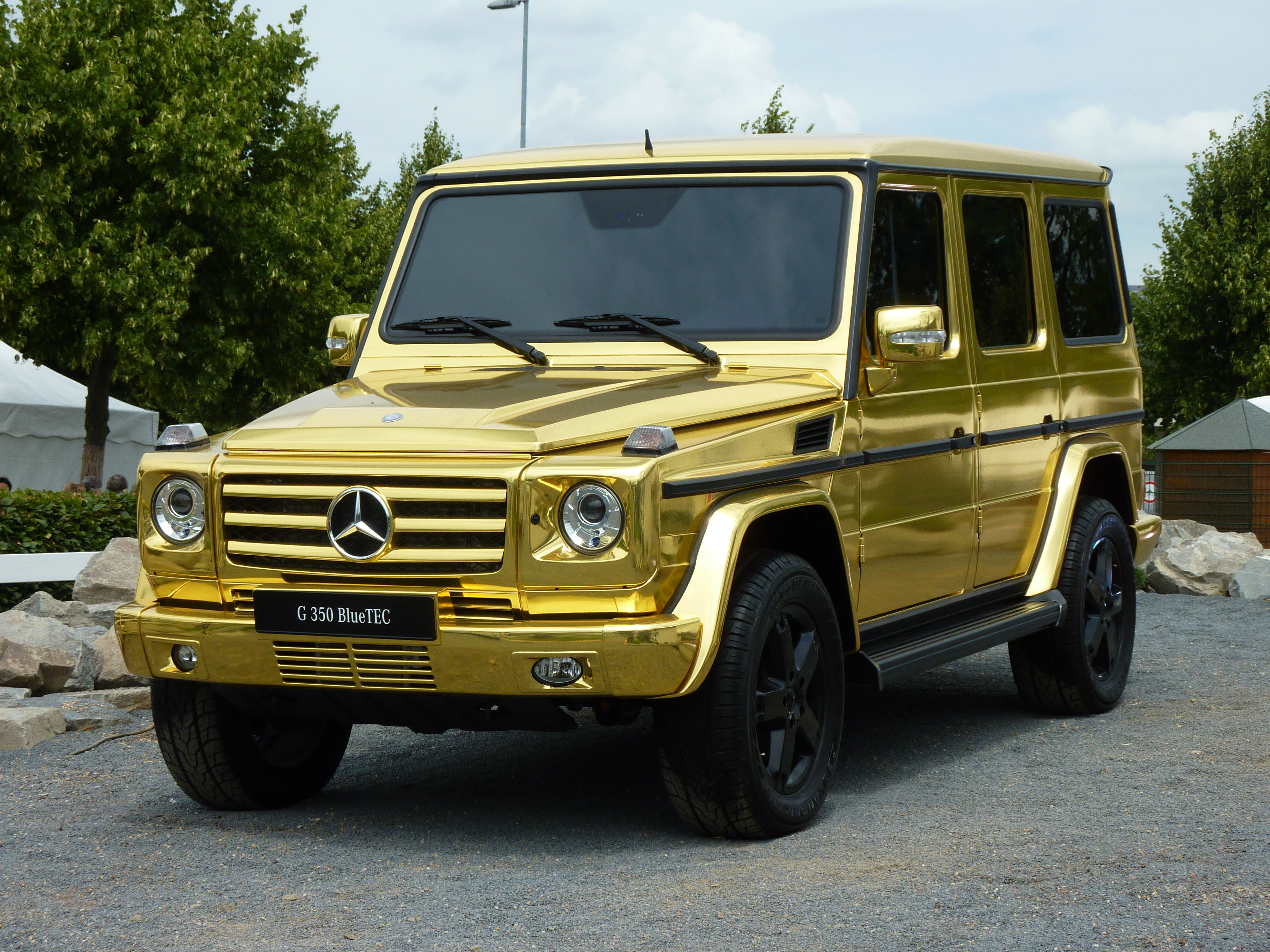 G 350 BlueTEC in Goldlackfoliendesign